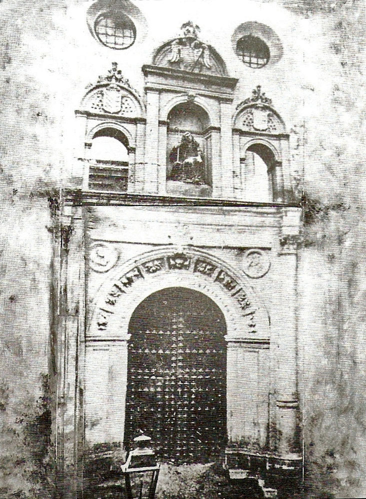 Portada de la desaparecida iglesia de san Gil en Granada.